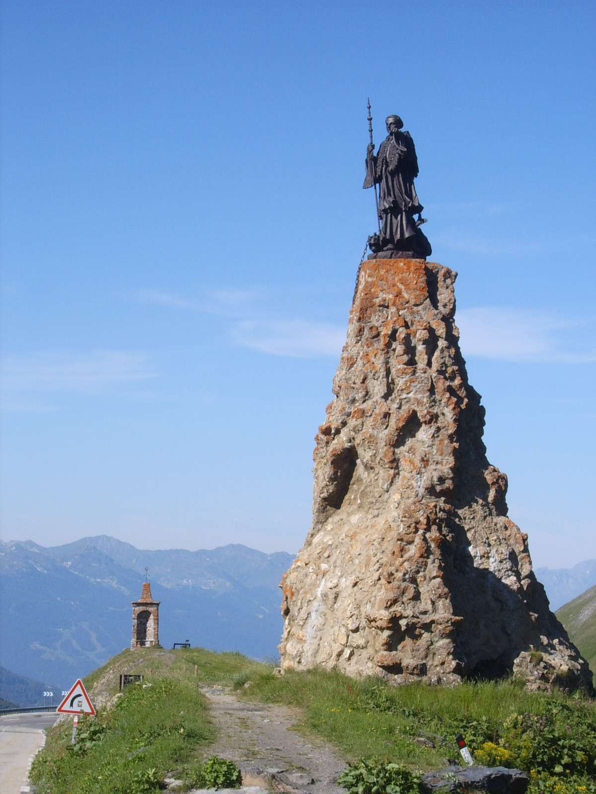 Statue de Saint-Bernard de Menthon, col du Petit Saint-Bernard Personal picture, I set it in public domain.